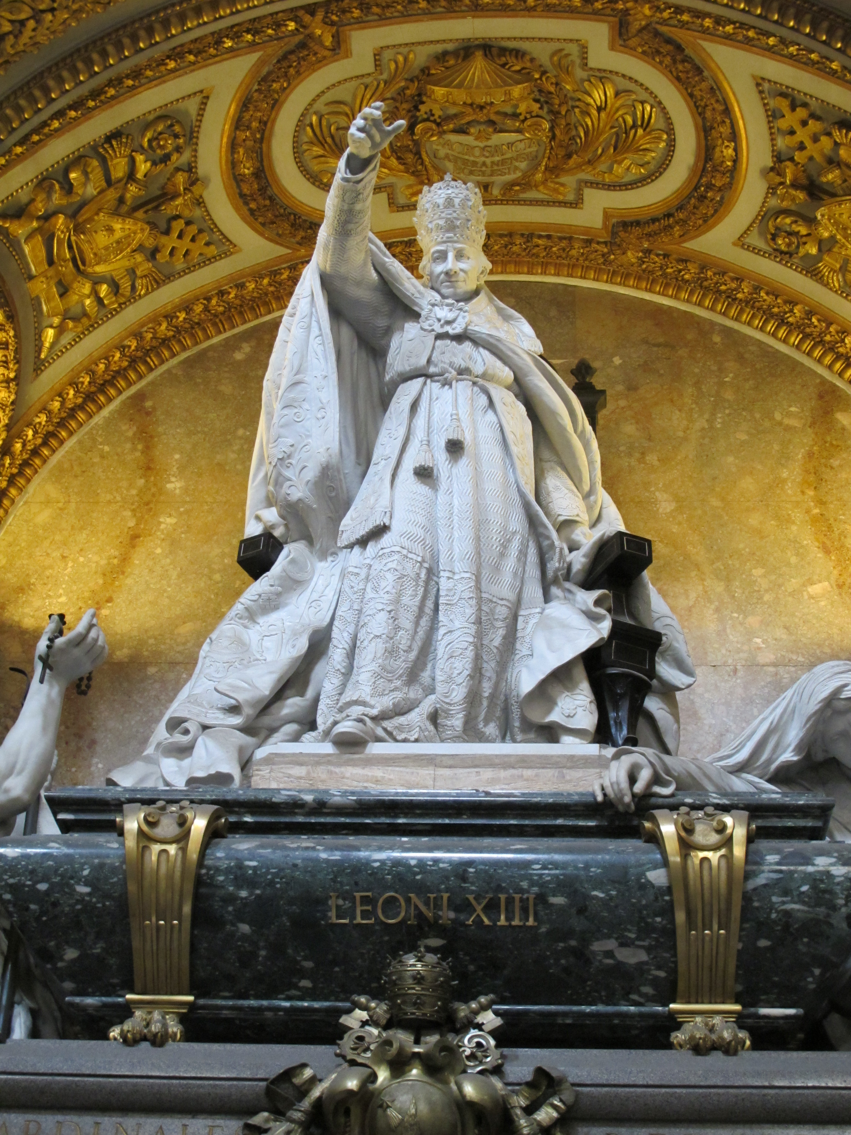 roma, san giovanni in laterano